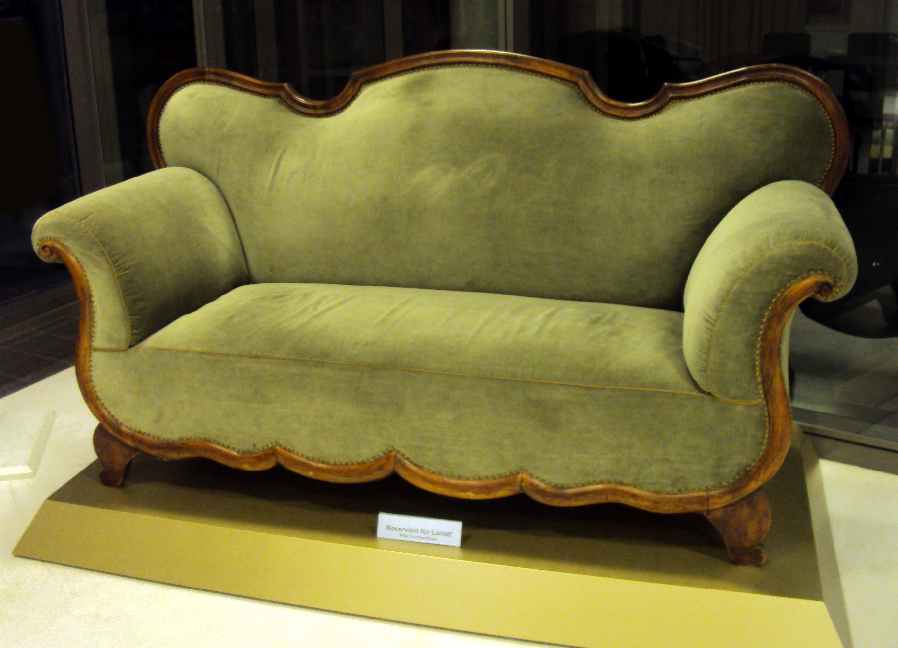 Das Originalsofa steht seit dem Tod von Loriot im Foyer vom Funkhaus Radio Bremen (August 2011)